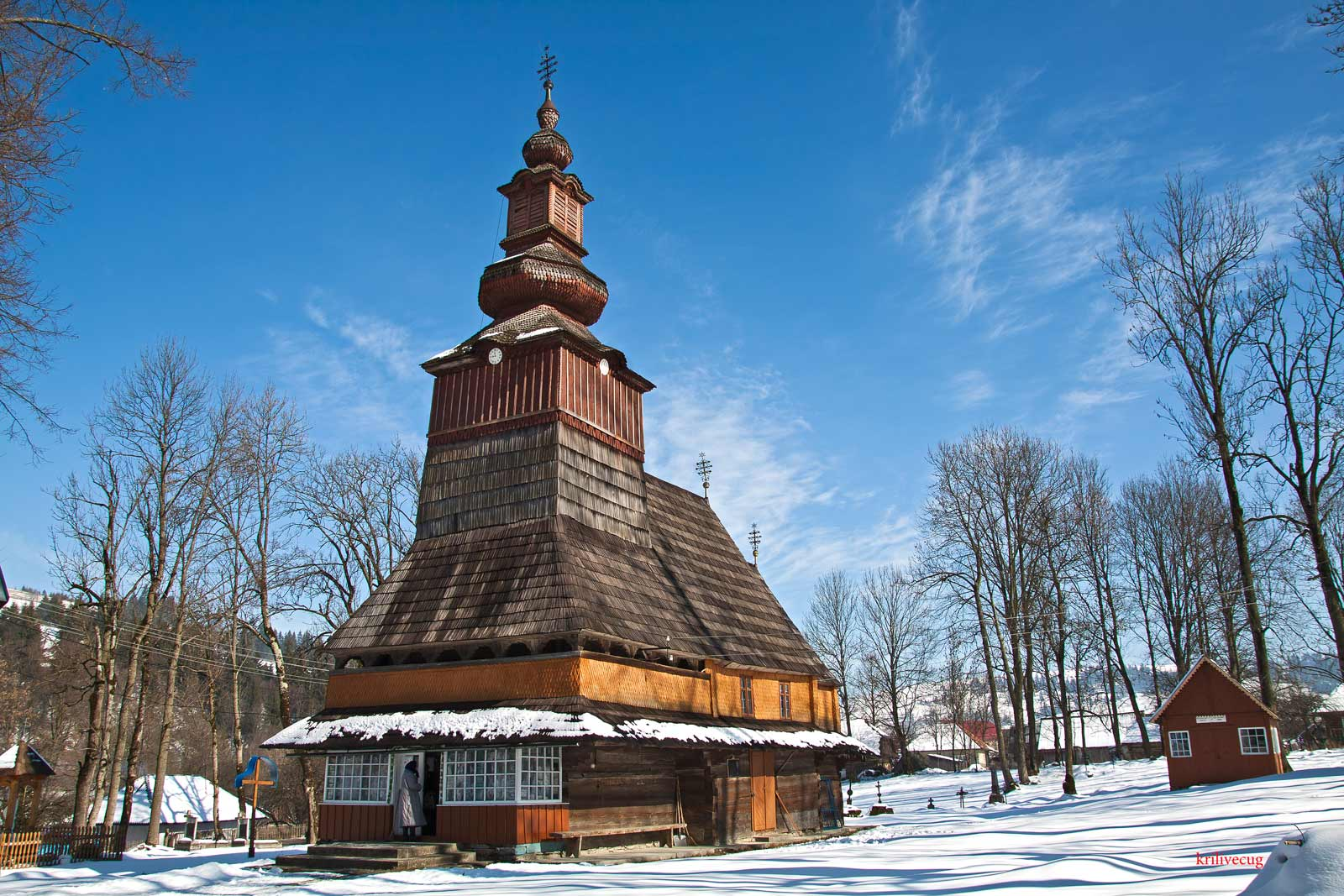 Дерев'яна церква в селі Пилипець. Міжгірського району. Храм Різдва Пресвятої Богородиці 1762 рік